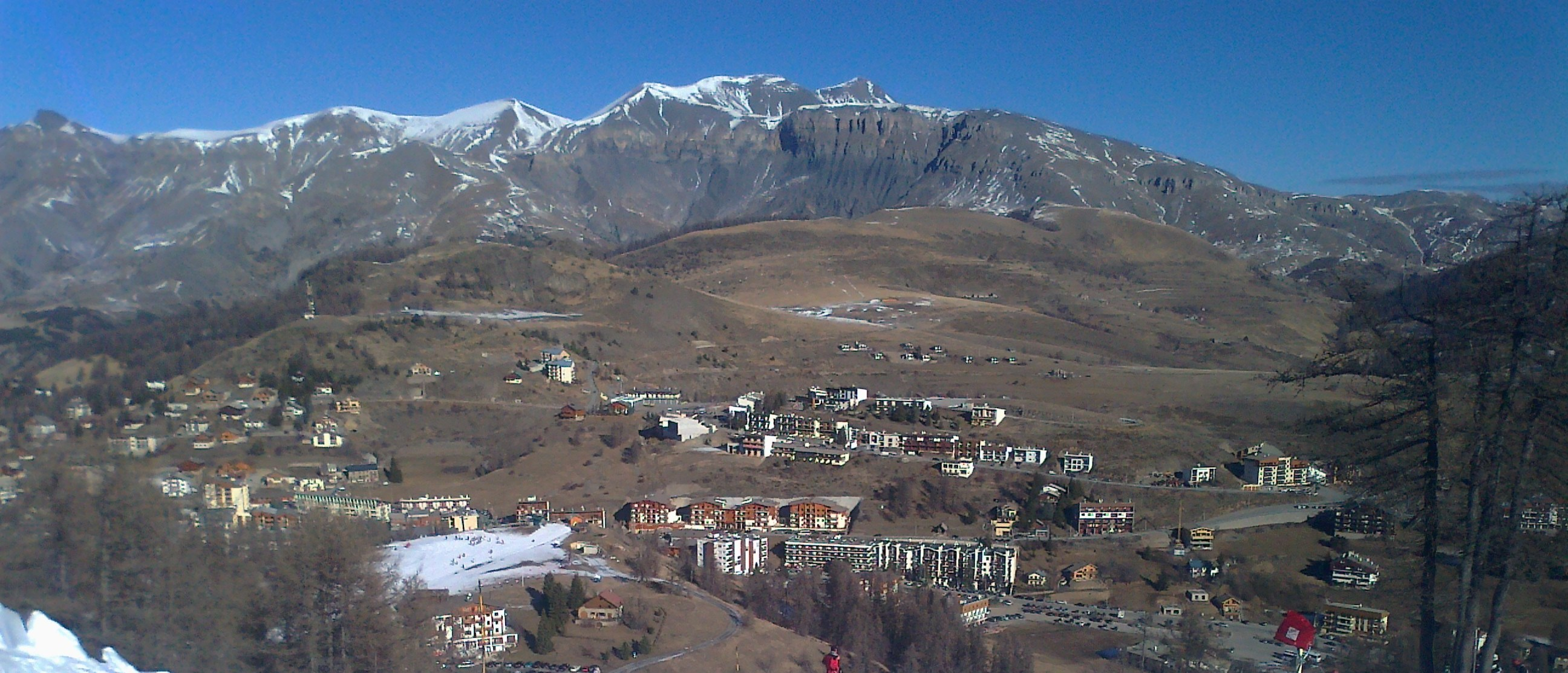 Vue partielle de la station de Valberg (06-FRANCE) avec, au Nord-Est, le massif du Mont-Mounier (2817 m).